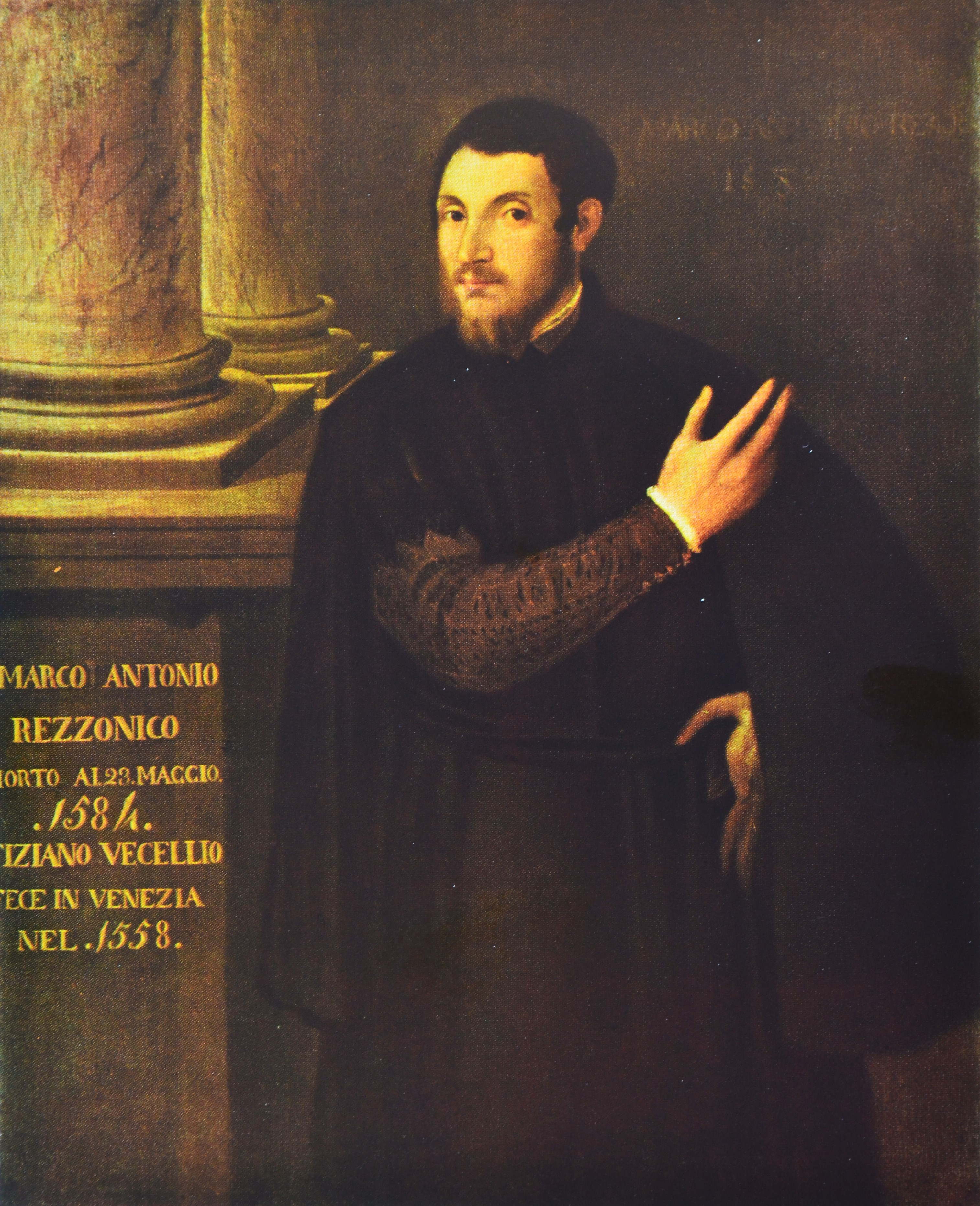 Anonimo veneto prima metà del XVI secolo, Milano, Raccolta di ritratti dei benefattori dell'Ospedale Maggiore. la dicitura dell'esecuzione di Tiziano è posticcia.